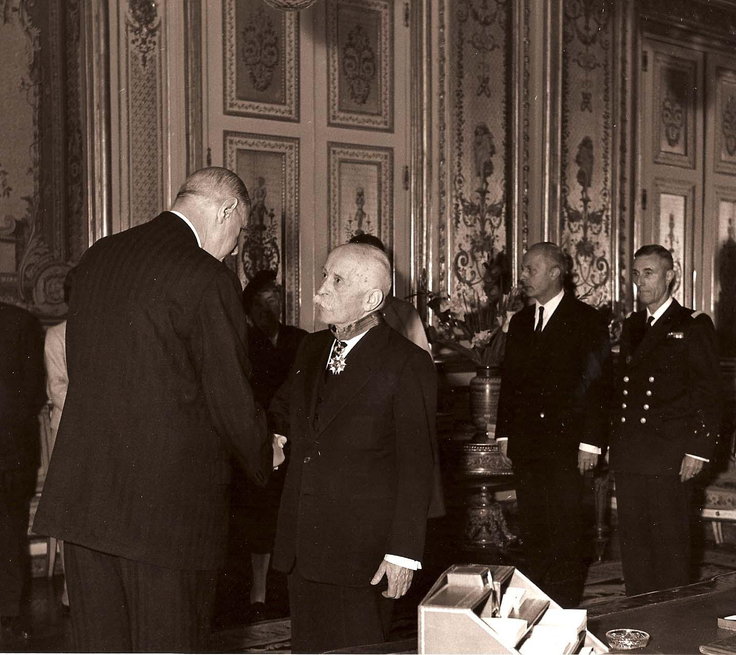 Le général de Gaulle remet la Légion d'honneur à Jules Basdevant.